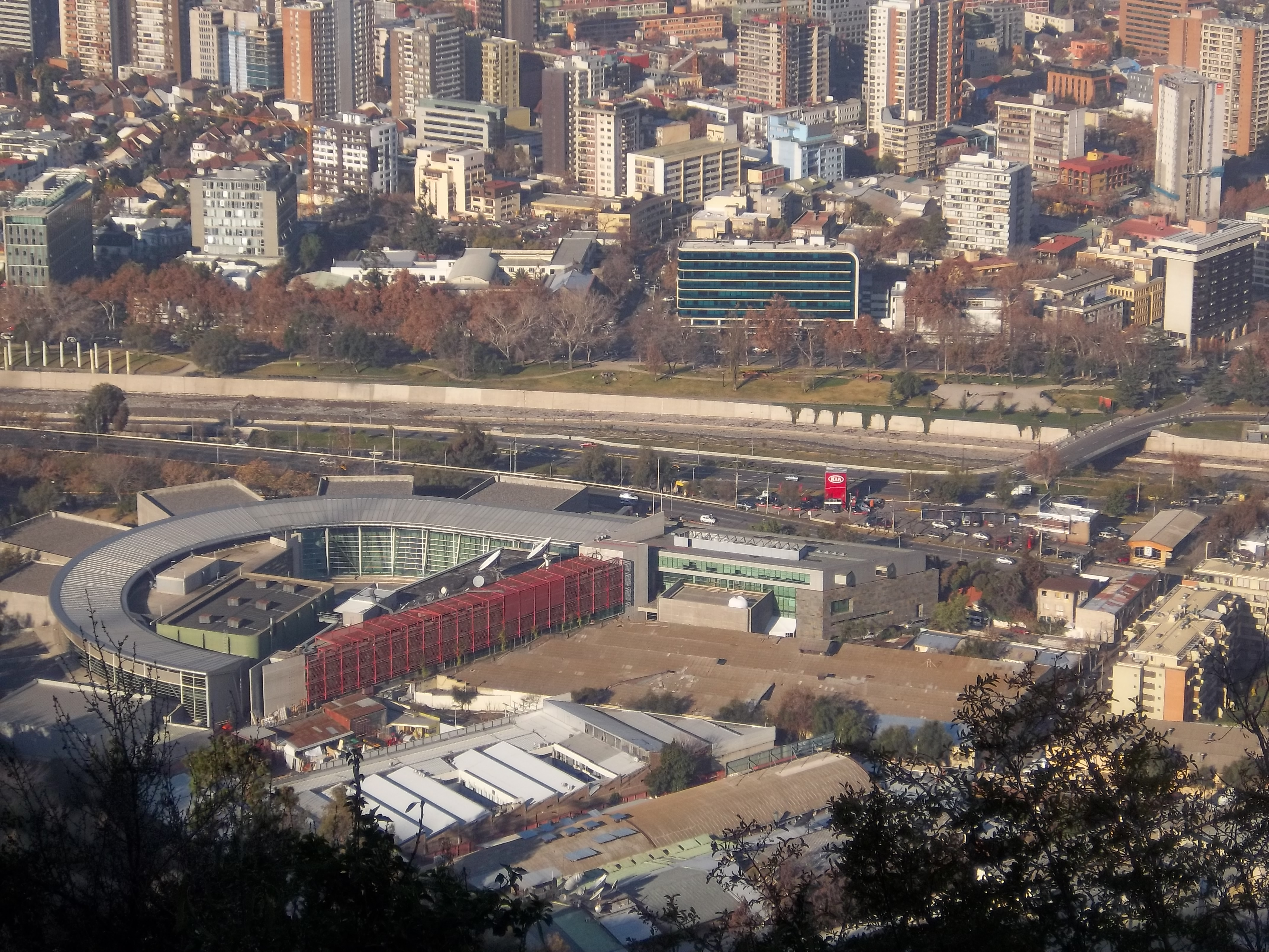 Edificio de Televisión Nacional de Chile fotografiado desde el Cerro San Cristóbal en Santiago de Chile.